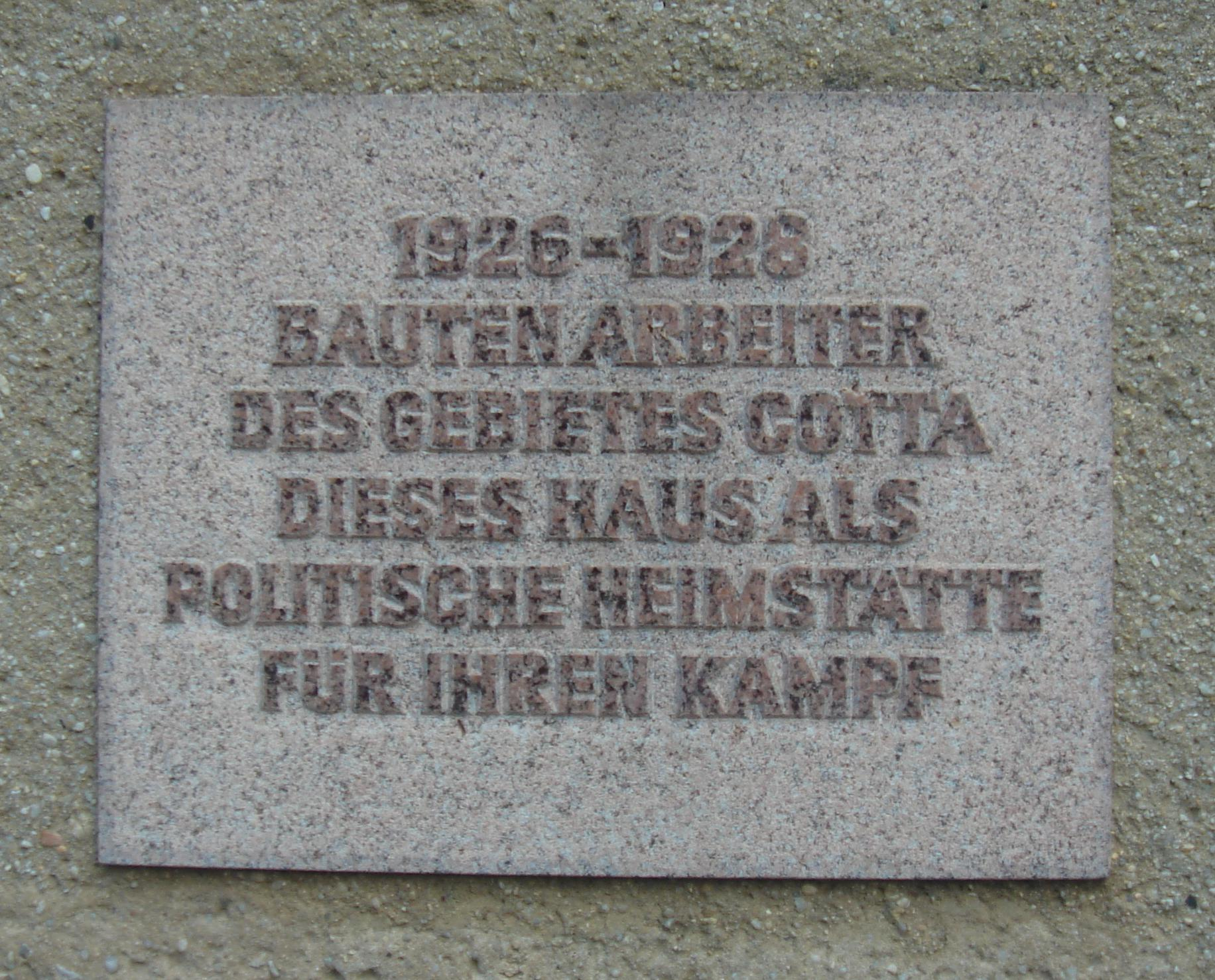 Erinnerungstafel an der straßenwärtigen Fassade des Volkshauses Dresden-Cotta